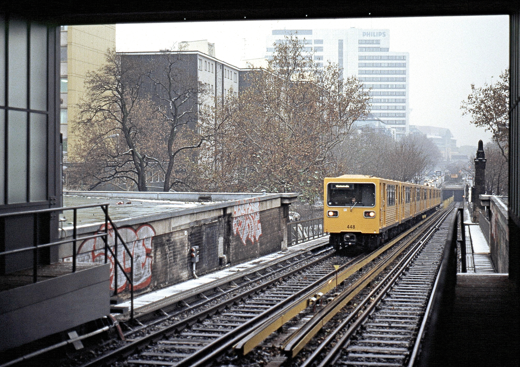 Berlin: U-Bahn-Rampe Nollendorfplatz mit GI-Zug vom Wittenbergplatz